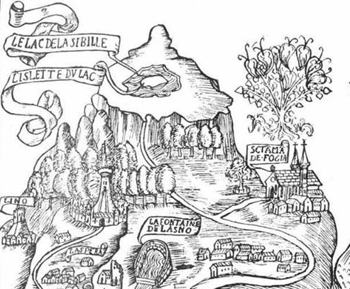 Disegno di Antoine De la Sale raffigurante il Monte Vettore con il Lago di Pilato (Lago della Sibilla) e la sorgente del fiume Aso